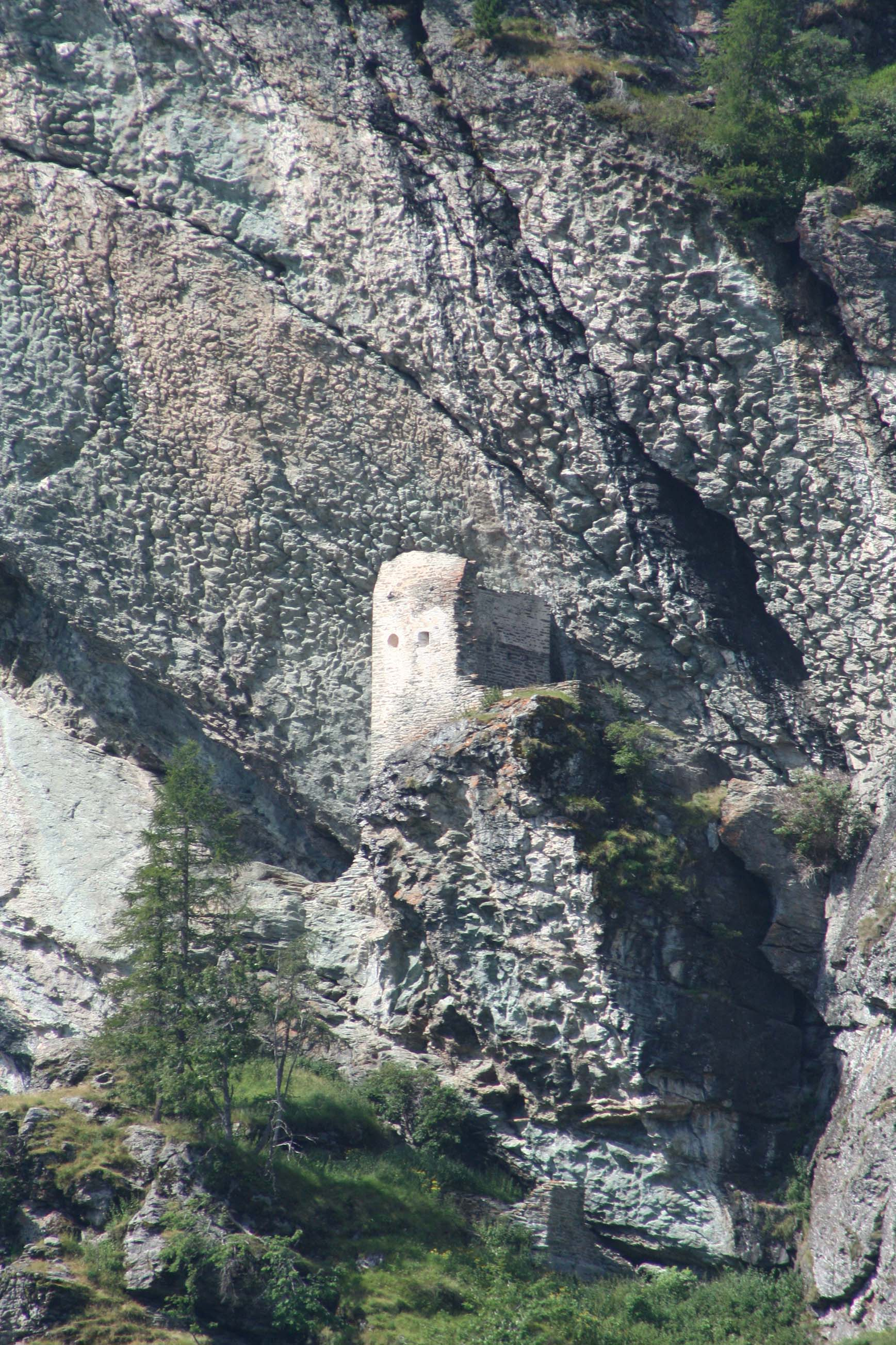 Kapelle